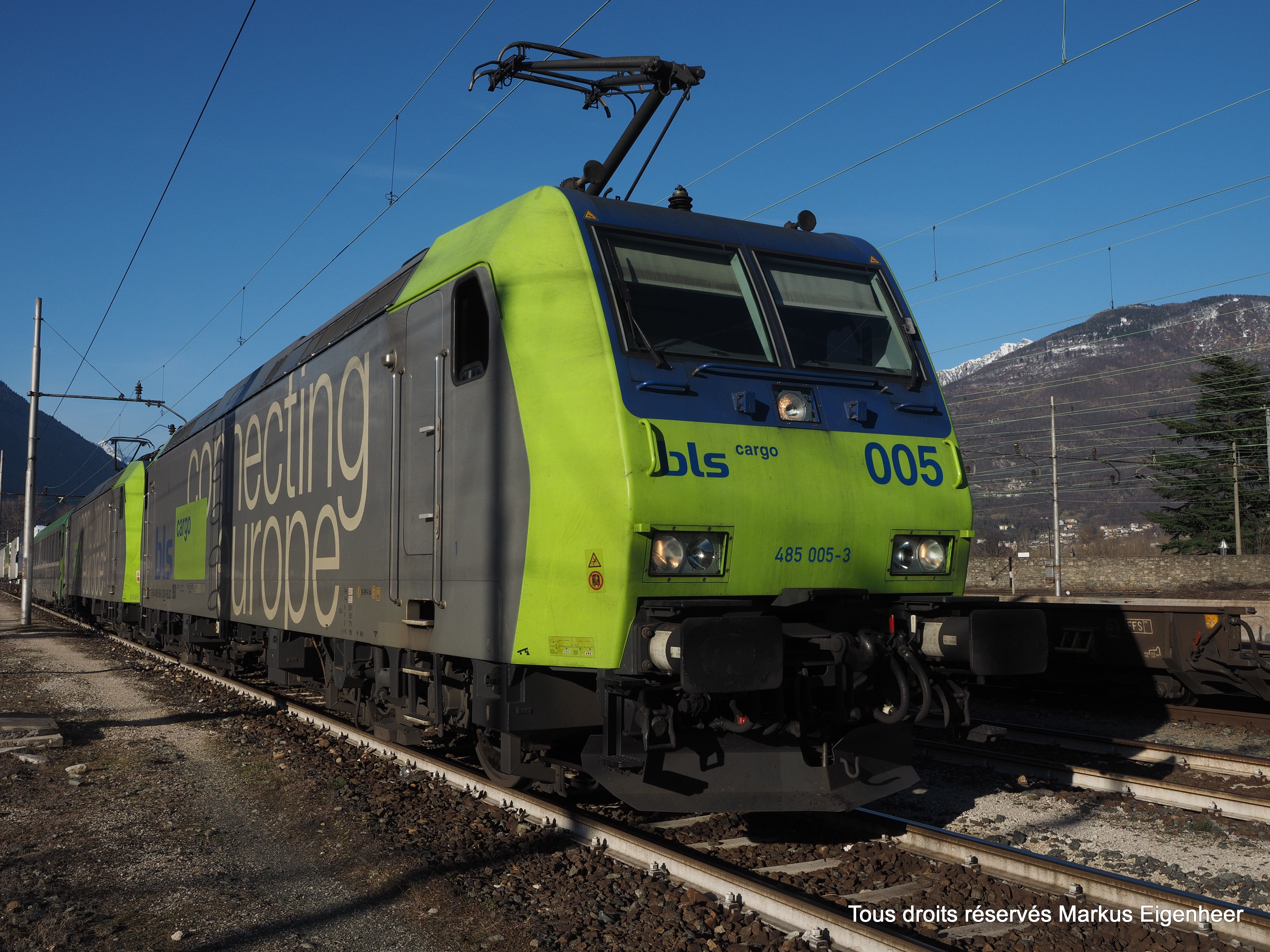 Domodossola 11.03.2015